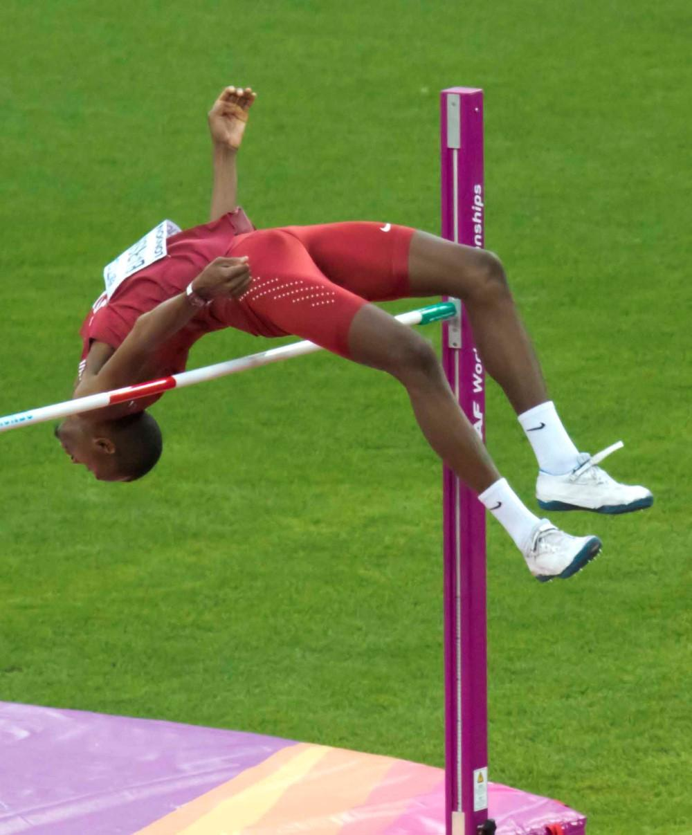 d9_5 finale hoog barshim